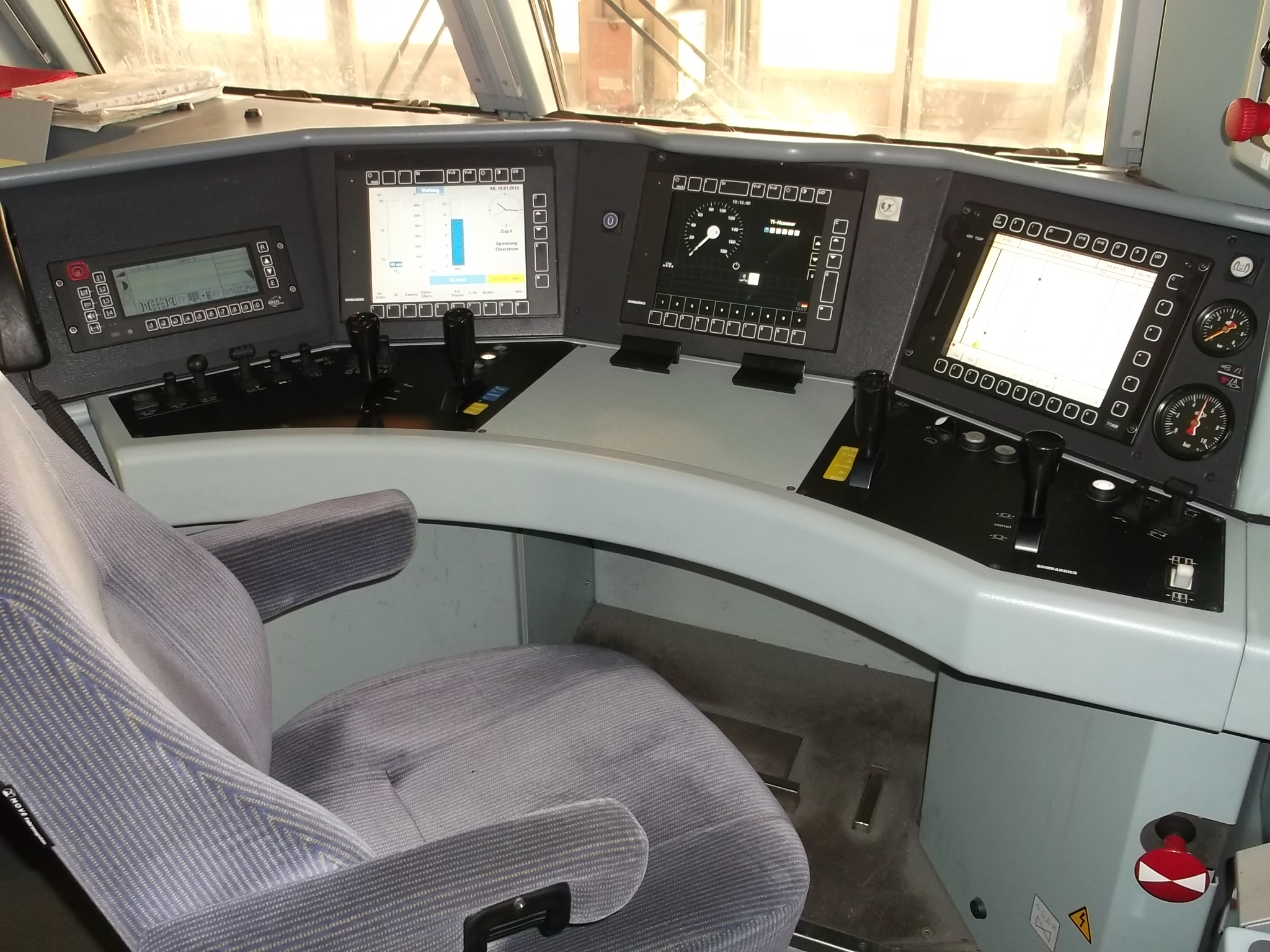 Lokbaureihe 186 - Führerraumbedienpult - Lokomotivenhalter: DBAG, DB Fernverkehr AG Berlin